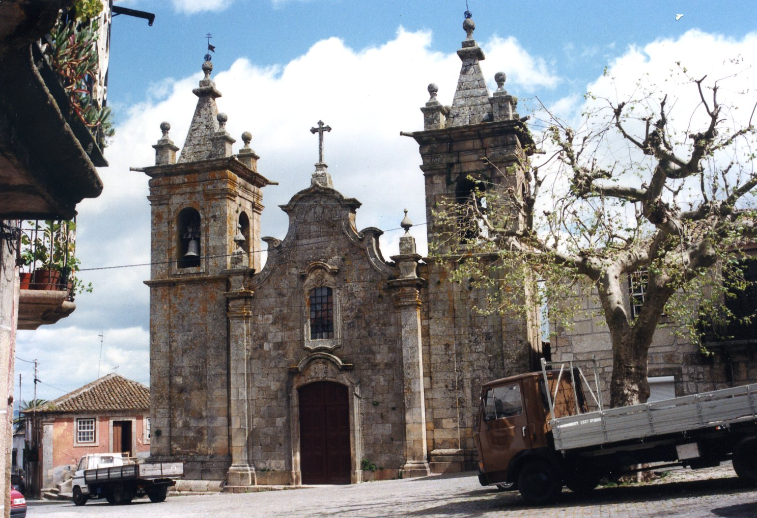 Igreja de Santa Maria This file was uploaded for Wiki Loves Monuments in Portugal with the unique identifier 72902.